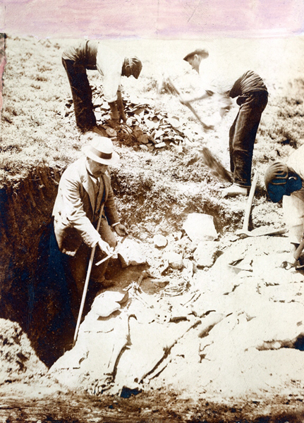 Enrique de Aguilera y Gamboa. Número de inventario: 1940-27-FF-00019.